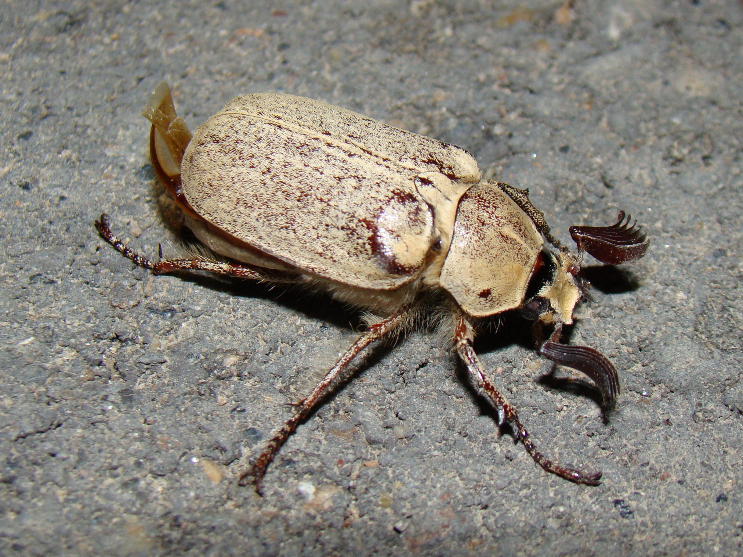 Хрущ белый (Polyphylla alba) . Окрестости города Байконур, Кызылординская область, Казахстан